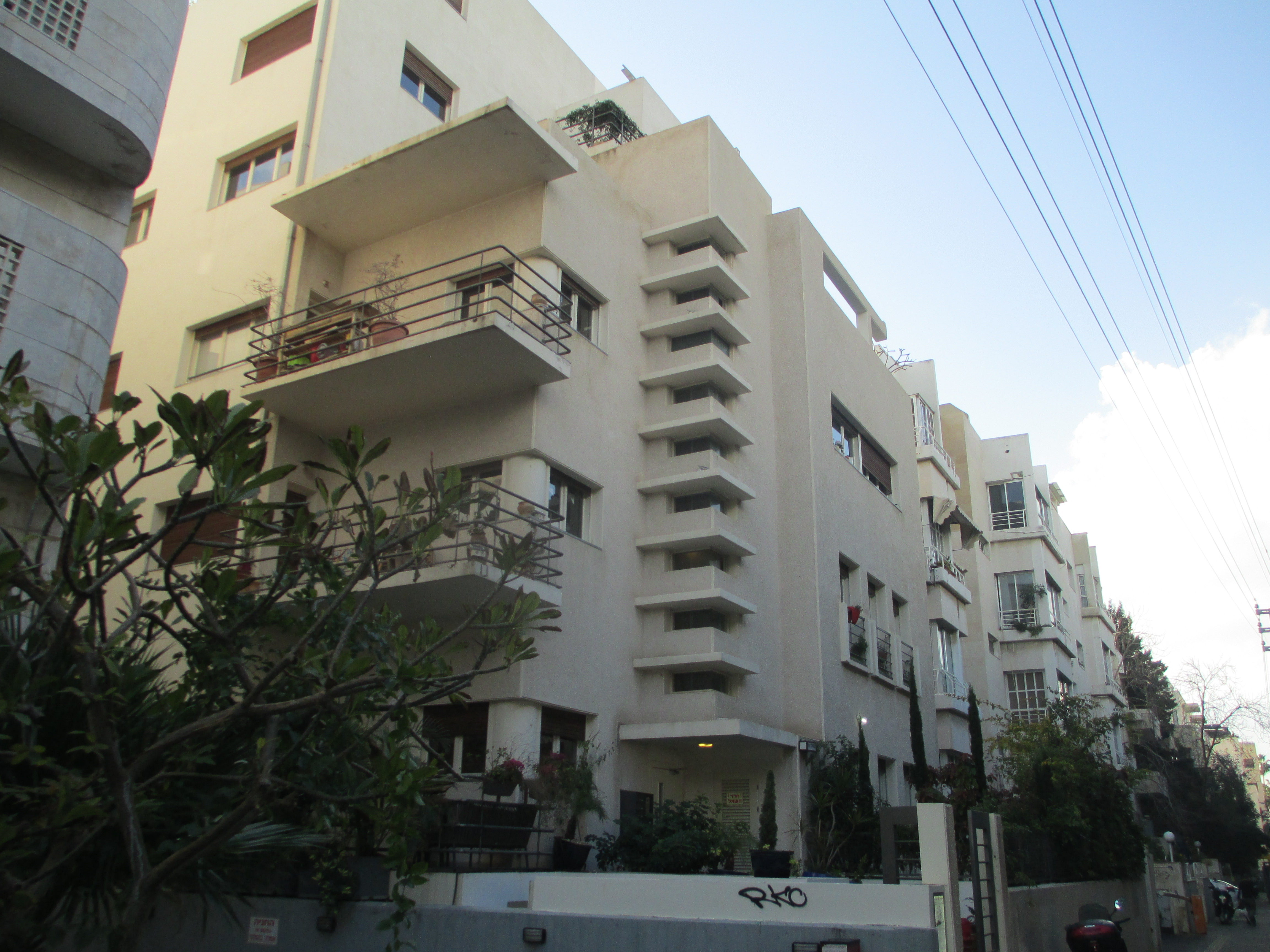 בית אקו"ם, רוטשילד 118 בתל אביב